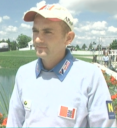 Bildbeschreibung: Markus Brier bei der Austrian Open im Fontana Golfclub Quelle: selbst mit einer Handy Camera aufgenommen Fotograf/Zeichner: Boss 16:16, 11 June 2006 (UTC) Datum: 8.6.2006 Sonstiges: GNU